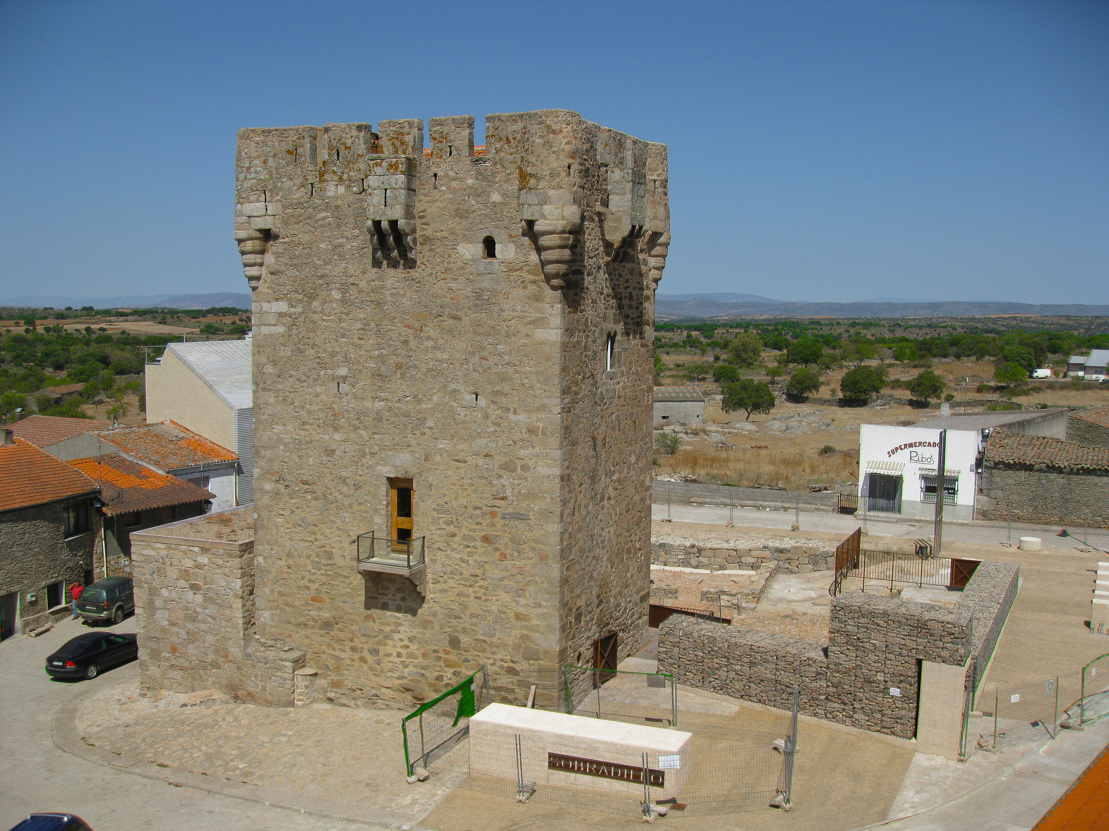 En Sobradillo se encuentra la Casa del Parque Natural Arribes del Duero "El Torreón de Sobradillo", punto de referencia y encuentro de los Espacios Naturales de Castilla y León.